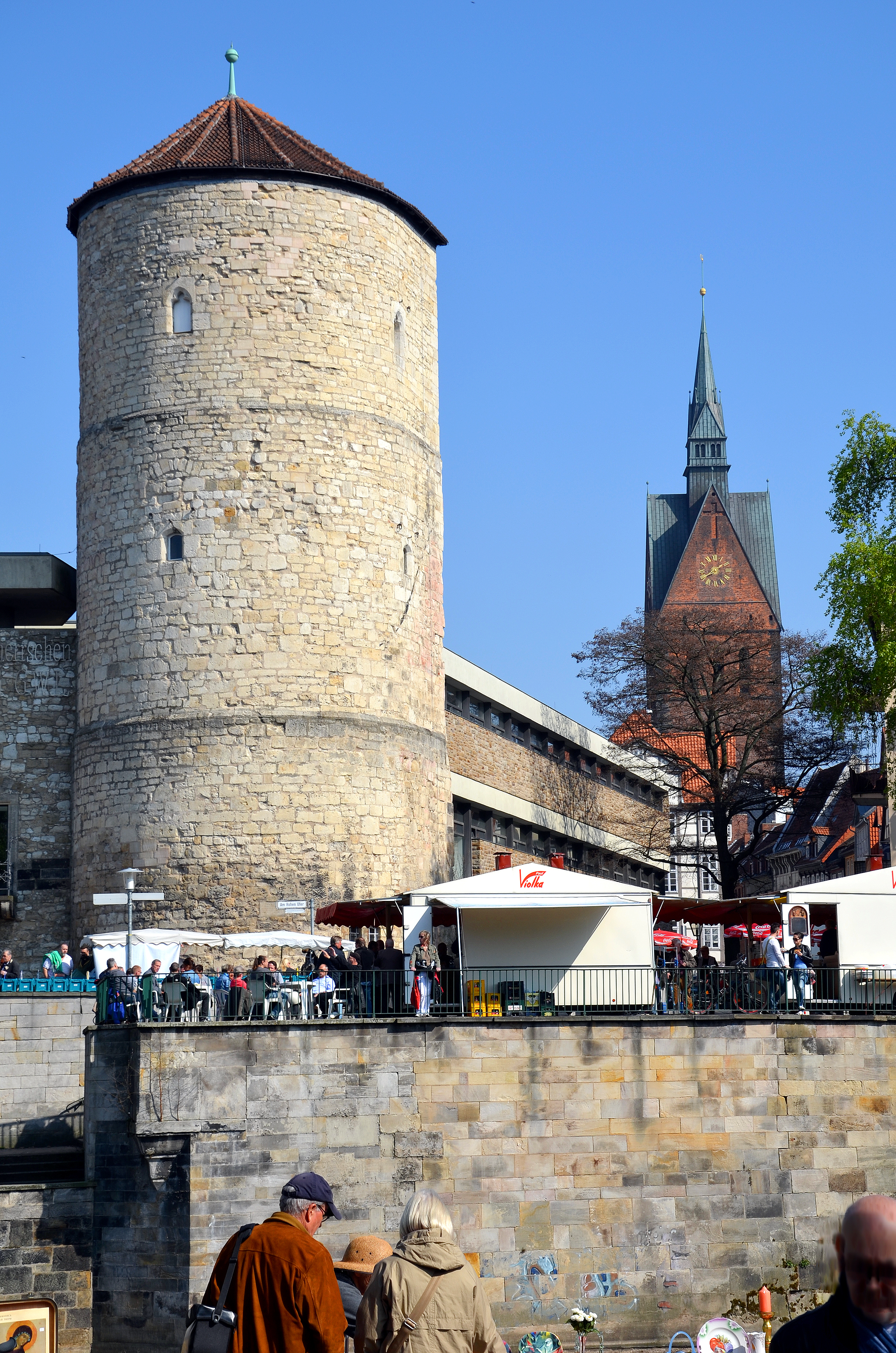 Blick wahrend des Altstadt-Flohmarkts in Hannover in Richtung der ehemaligen Sommerbrücke am Beginenturm und durch die Pferdestraße zur Marktkirche. Im Jahresverlauf verdecken zeitweilig die Blätter der Bäume diese Ansicht ...